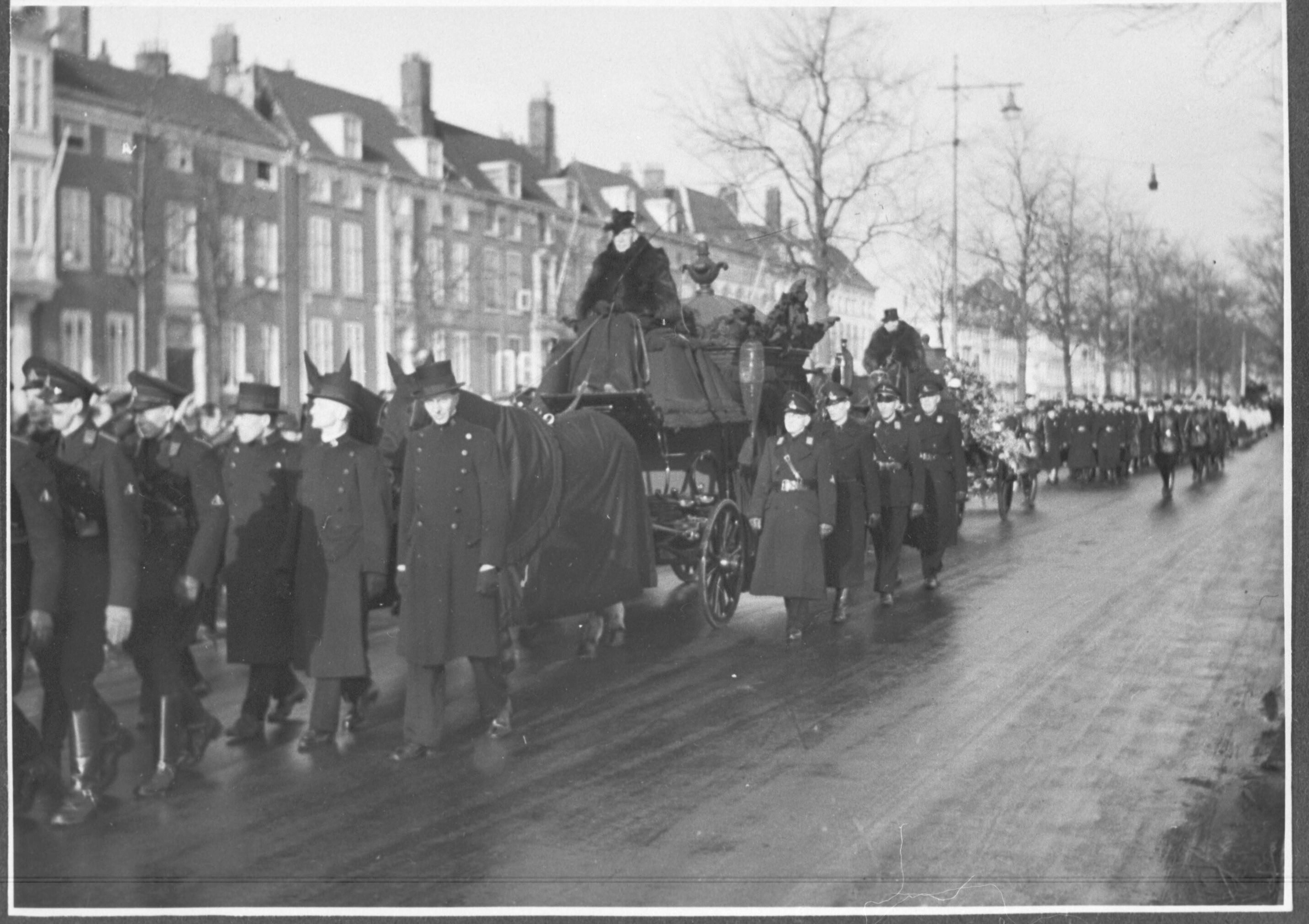 'Begrafenis van kameraadske Reydon te Lunteren. Mevrouw Reydon, vrouw van de gevolmachtigde van den Leider voor Volksvoorlichting H. Reydon, werd het directe slachtoffer van een moordaanslag op 9 februari 1943. Reydon zelf stierf pas op 24-8-1943 aan de gevolgen van deze aanslag.' De aanslag werd gepleegd door G.W. Kastein van de verzetsgroep CS-6 uit Amsterdam. Deze foto is afkomstig uit het archief van de Fotodienst der NSB.